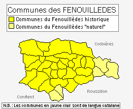 Carte de la région naturelle des Fenouillèdes différenciant les communes occitanes des communes catalanes